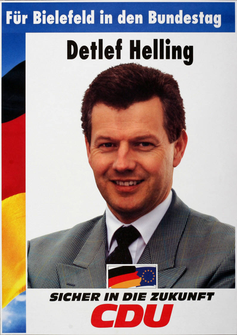 Für Bielefeld in den Bundestag Detlef Helling Sicher in die Zukunft CDUAbbildung:Porträtfoto - NationalfarbenPlakatart:Kandidaten-/Personenplakat mit PorträtObjekt-Signatur:10-001: 4018Bestand:Plakate zu Bundestagswahlen (10-001)GliederungBestand10-18:Plakate zu Bundestagswahlen (10-001) » Die 13. Bundestagswahl am 16. Oktober 1994 » CDU » Mit PorträtfotoLizenz:KAS/ACDP 10-001: 4018 CC-BY-SA 3.0 DE